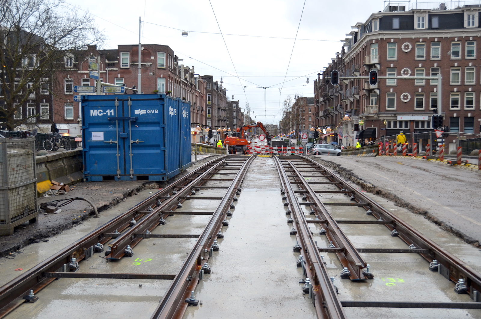 Drierailig tramspoor op de Rozengracht bij de Nassaukade. Na de spoorvernieuwing in november 2017 keerde de derde rail die herinnert aan de vroegere tramlijn Amsterdam - Haarlem - Zandvoort weer terug. Let op: het spoor is niet symmetrisch gemonteerd. Foto: Erik Swierstra.